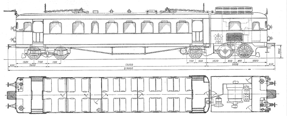 Typenskizze des Triebwagen BCe 2/5 der Burgdorf-Thun-Bahn (BTB)